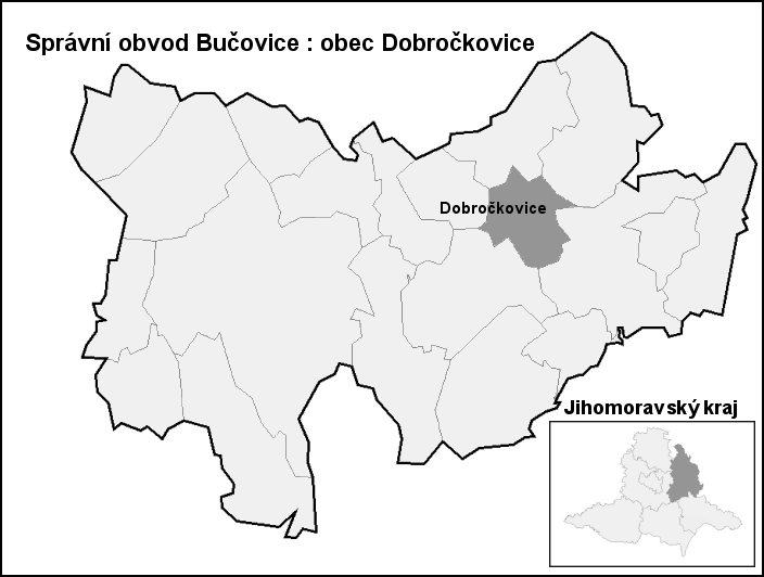 Hranice Dobročkovice (Vyškov-(Bučovice)- czech republic)